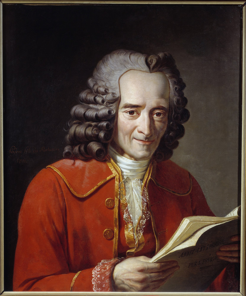 "Voltaire lisant L’année littéraire de Fréron", huile sur toile de Jacques Augustin Catherine Pajou, 1811